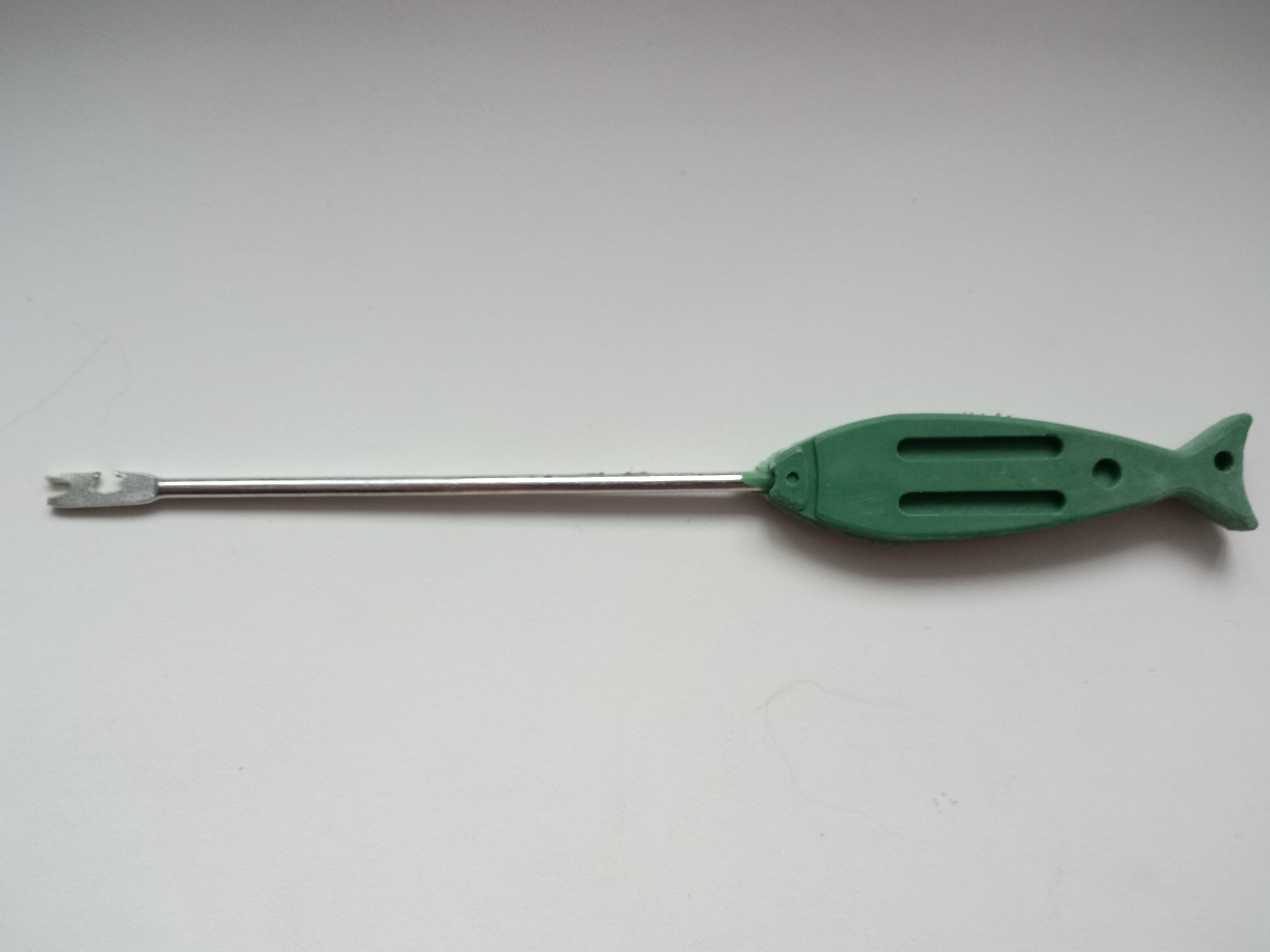 экстрактор